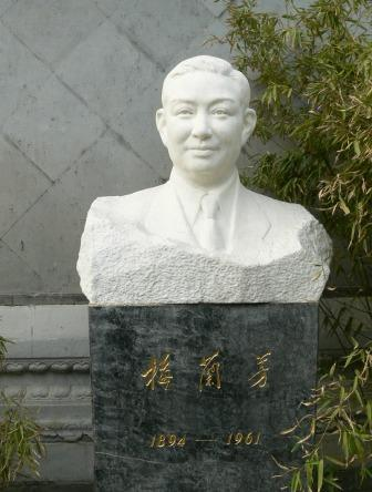 梅兰芳半身塑像 用心阁于2005年4月16日拍摄于梅兰芳故居